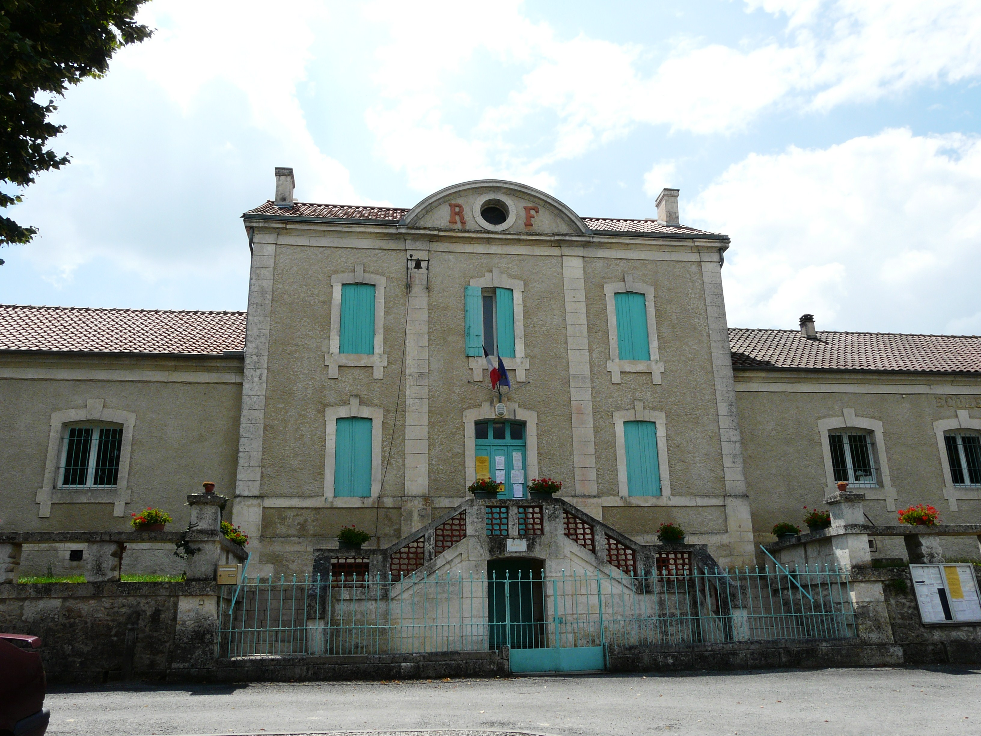 La mairie de Grand-Brassac, Dordogne, France.